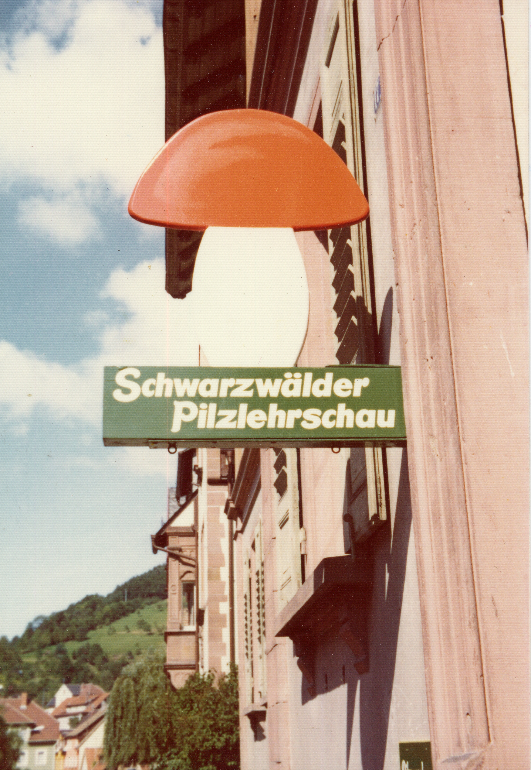 Schild der Schwarzwälder Pilzlehrschau